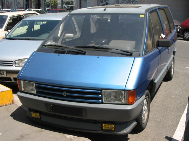 Photographie personnelle d'une Renault Espace 1 Phase 1 2000 TSE. Photo réalisée le 20 juin 2006